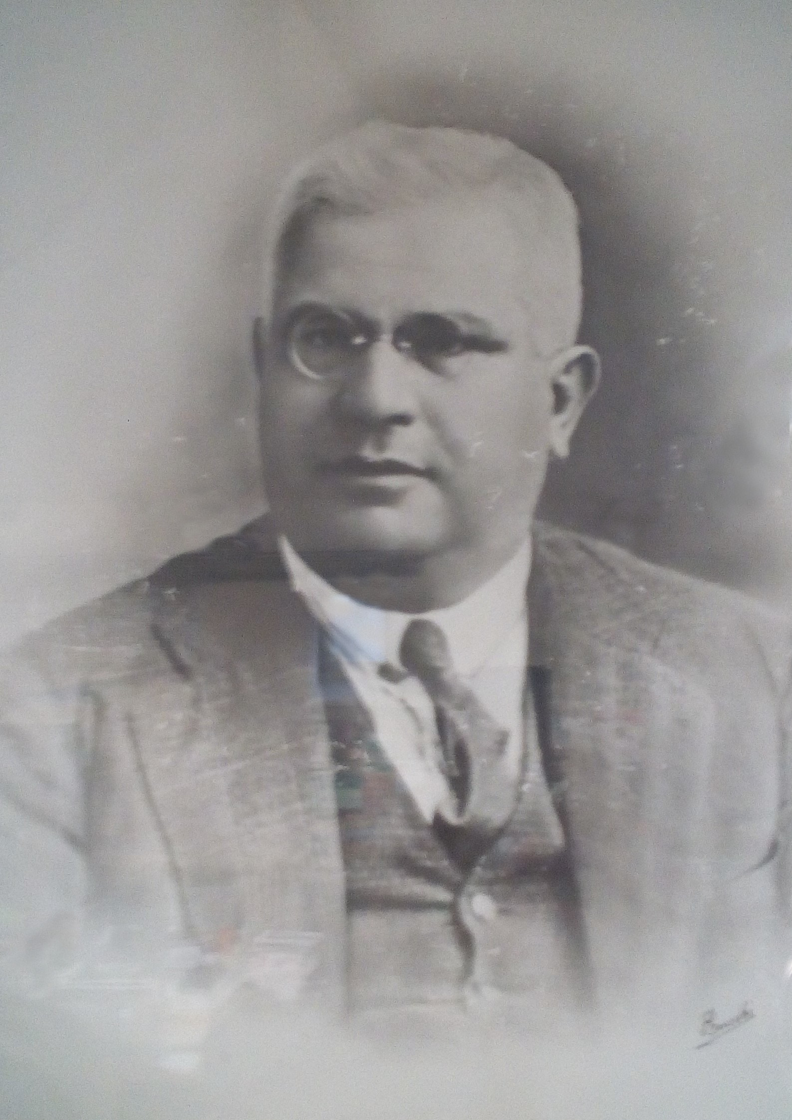 Foto di conservata presso il Liceo Classico Nolfi di Fano